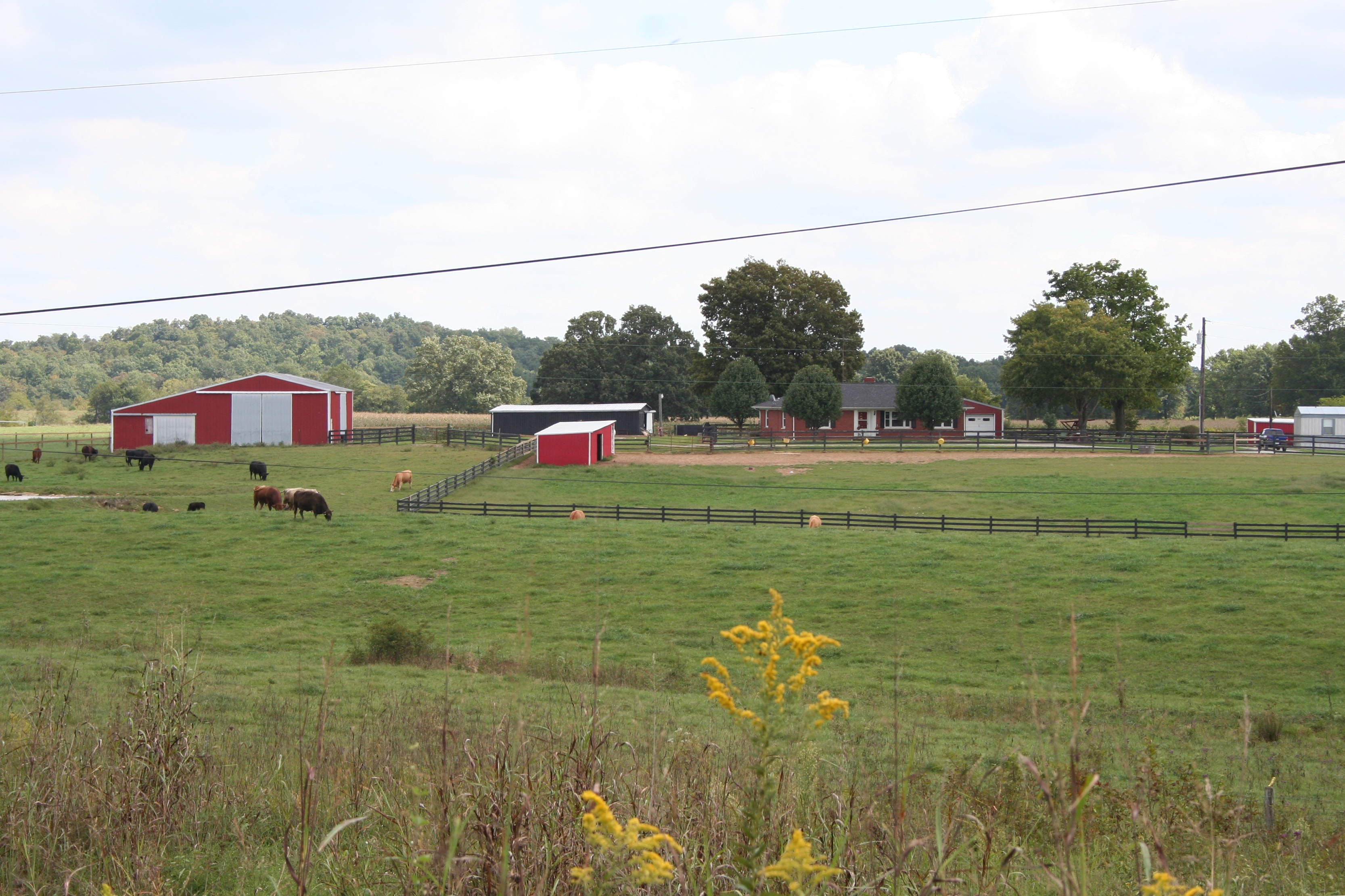 Farm in Kentucky, südlich von Louisville